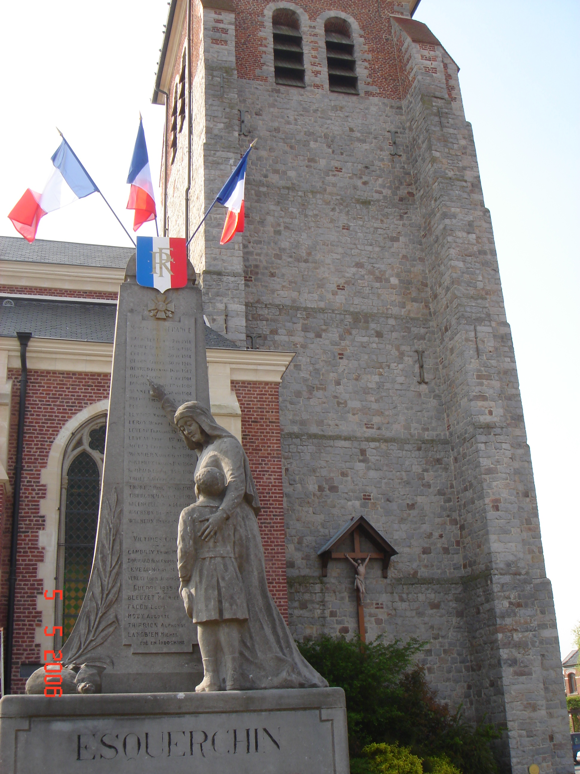 Equerchin Eglise Monuments aux morts